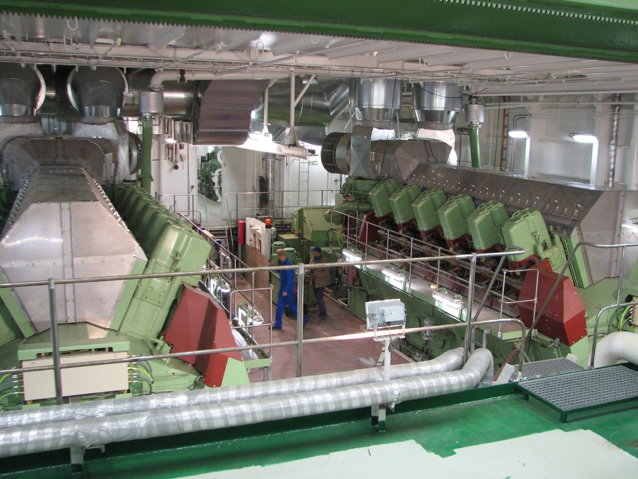 Flensburger Schiffbau Gesellschaft